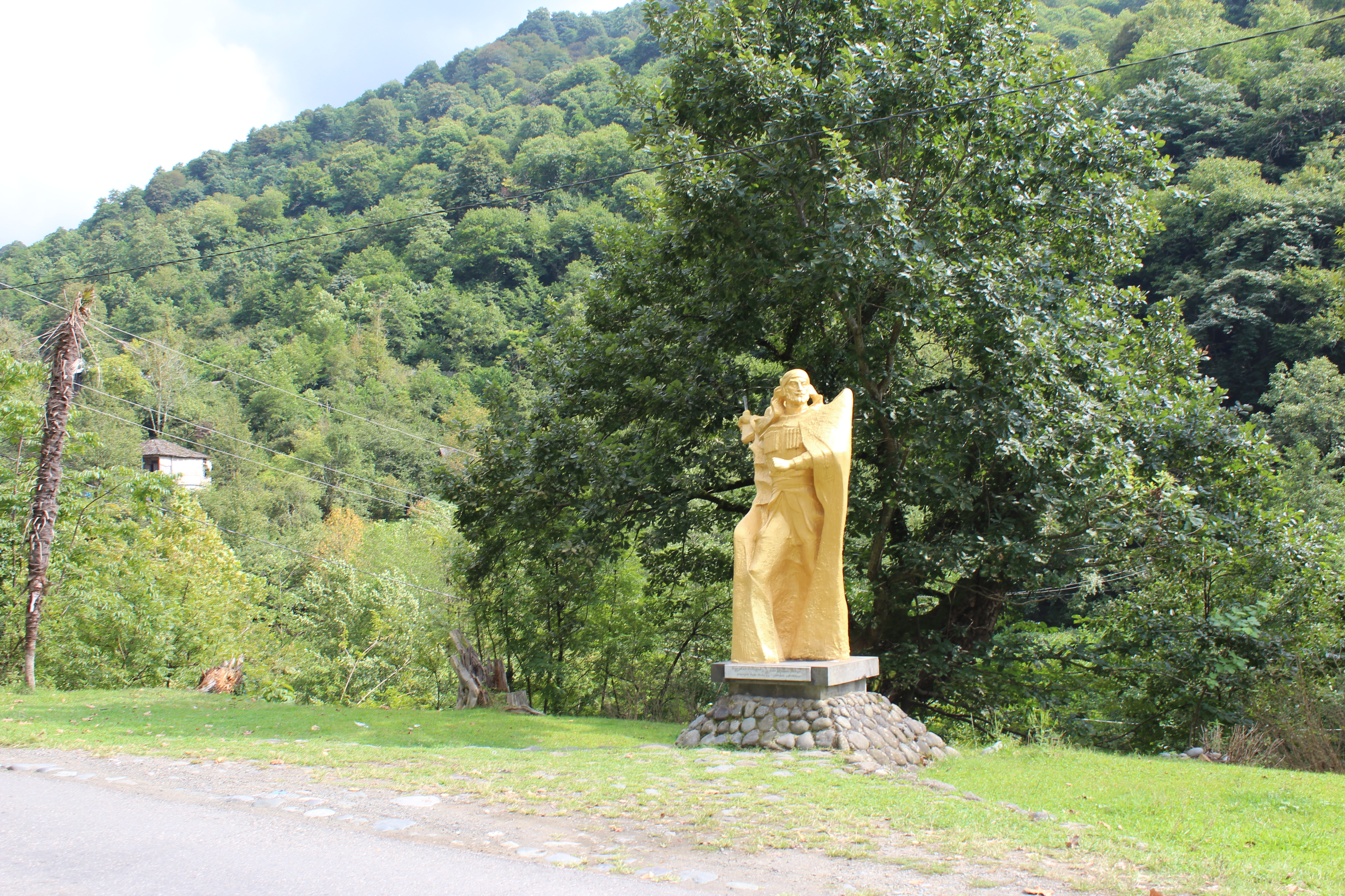 წარწერა ძეგლზე: ბუღარაა მამალაძე გურიის და ხალხის მხსენი დალოცოს ჩვენი მხარე დევ-გმირების გამომზრდელი